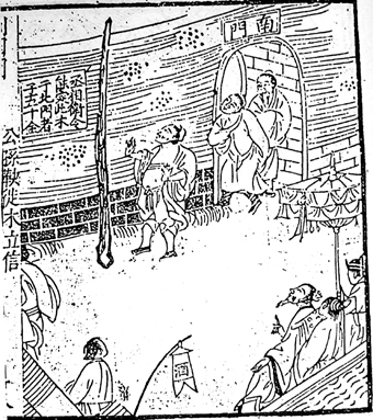 徙木立信，载明刻本《新列國志》插图